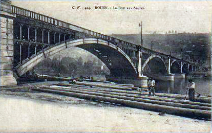 Carte postale ancienne de Rouen, Le Pont aux Anglais